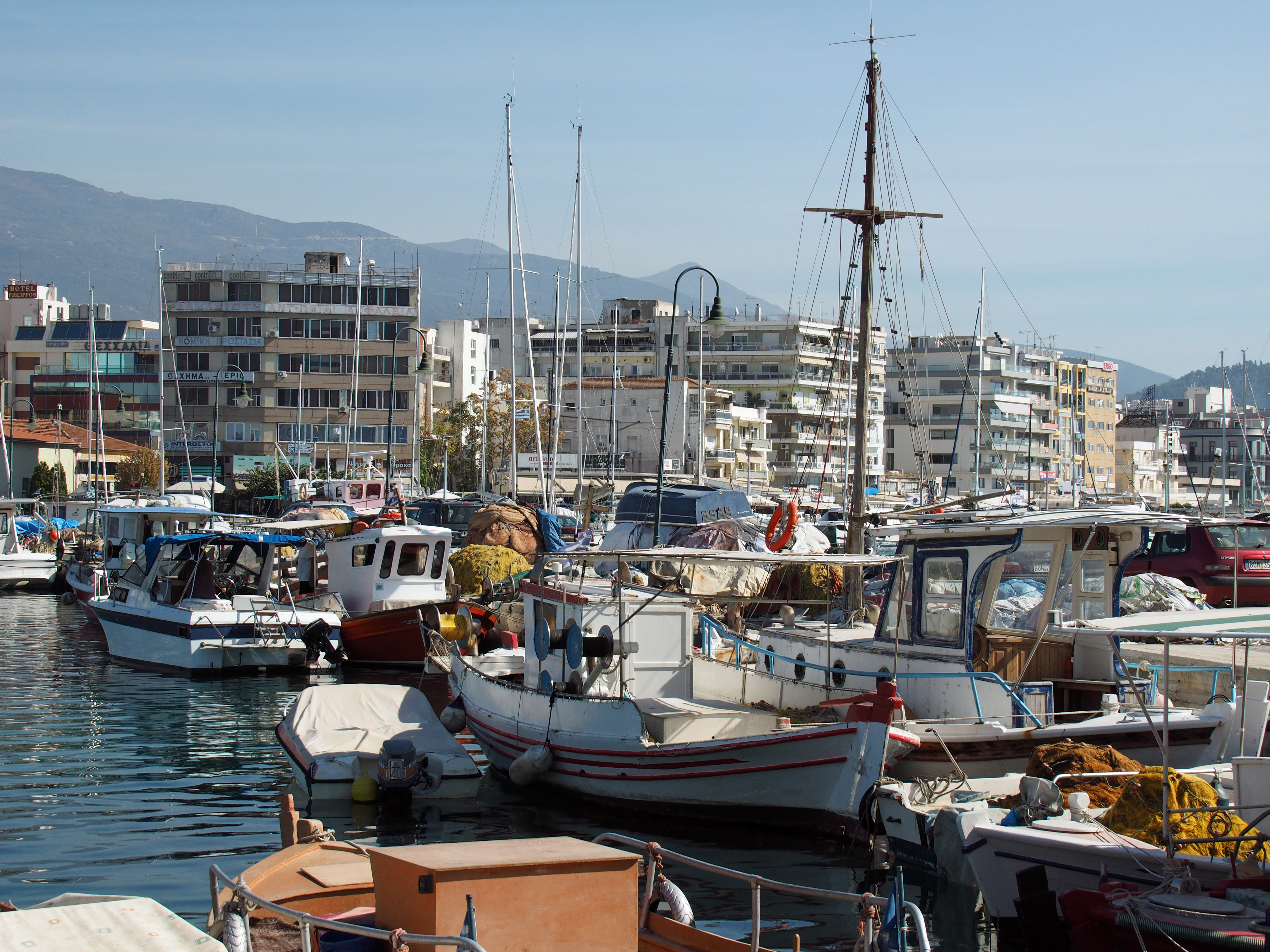 Volos (Griechenland), Fischerboote im Fischereihafen